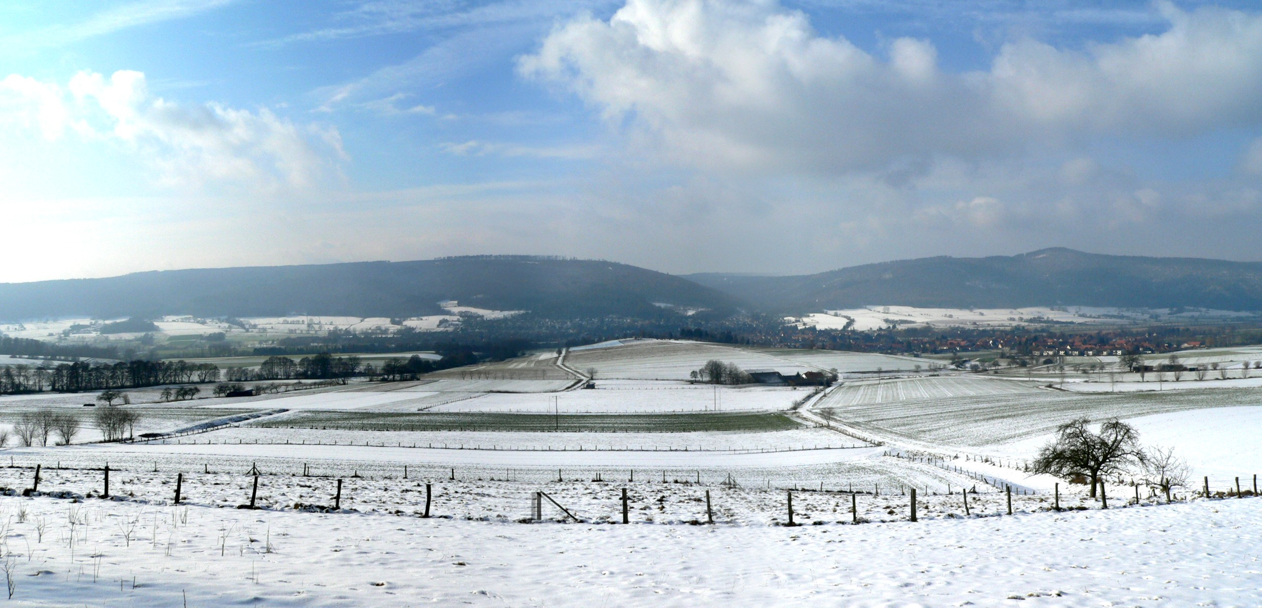 Reinhardshagen, Ortsteil Veckerhagen. Rechts im Bild Hemeln, Ortsteil von Hann. Münden. Quelle: selbst fotografiert Fotograf: presse03 11:26, 20. Feb 2006 (CET) Datum: Februar 2006